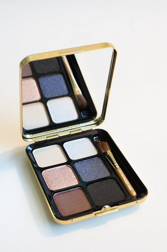 creme royale, silver fog, honey lust, stately black, manor, velvet lady